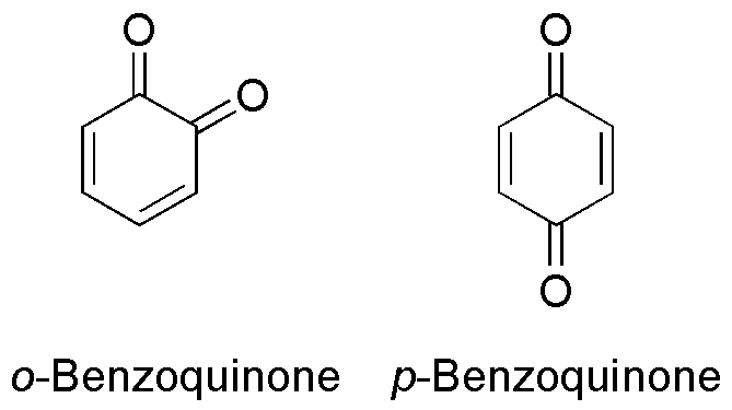 Chemical structures of o-benzoquinone (1,2-benzoquinone)and p-benzoquinone (1,4-benzoquinone)